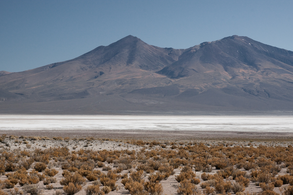 Vista parcial el Salar de Chiguana en el departamento de Potosí, al sur del Salar de Uyuni.